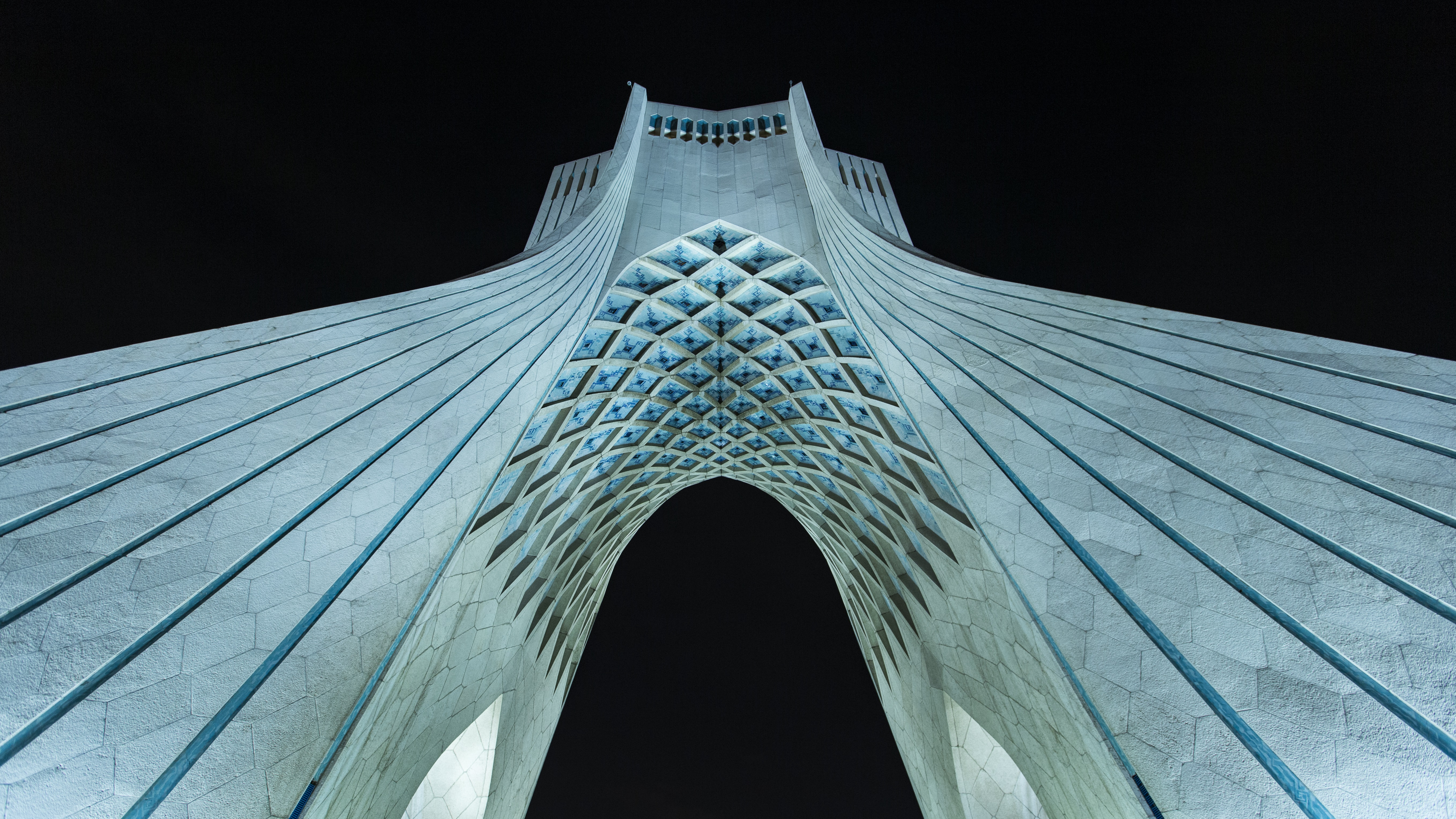 برج آزادی